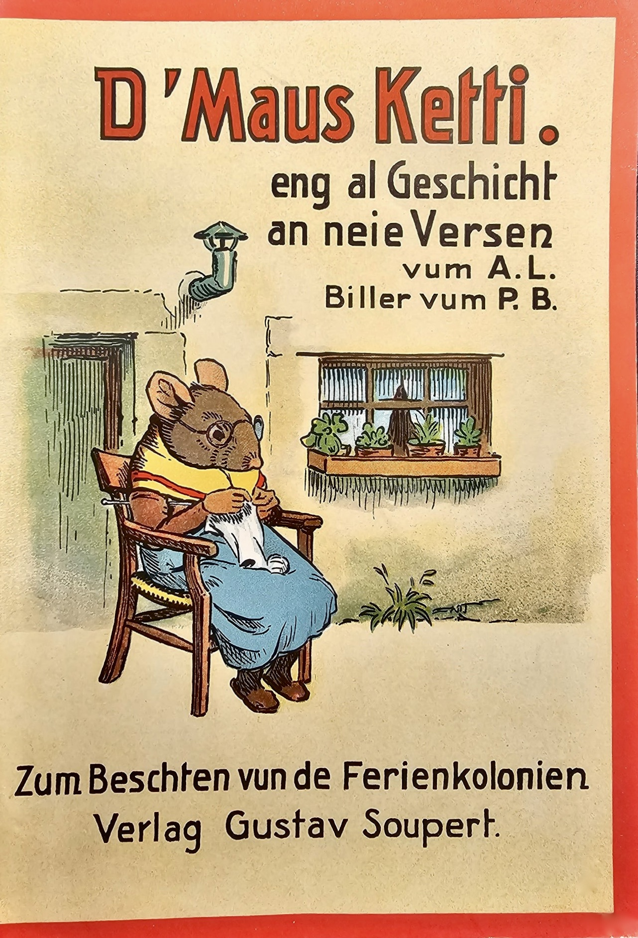 Titelsäit vun der Maus Ketti, Zeechnunge vum Pierre Blanc, Editions Soupert, 1936.